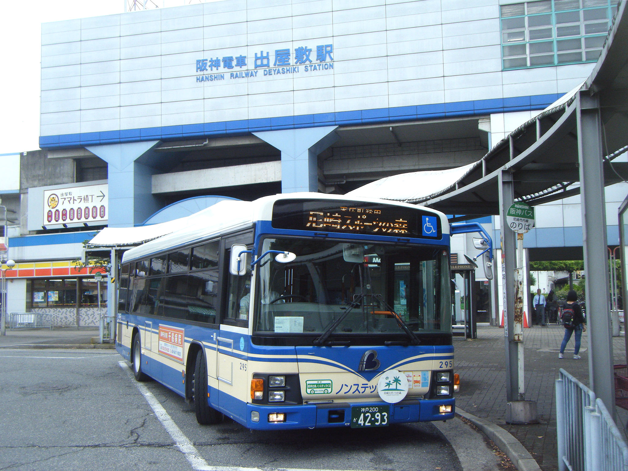 阪神バス 尼崎スポーツの森行 阪神出屋敷バス停